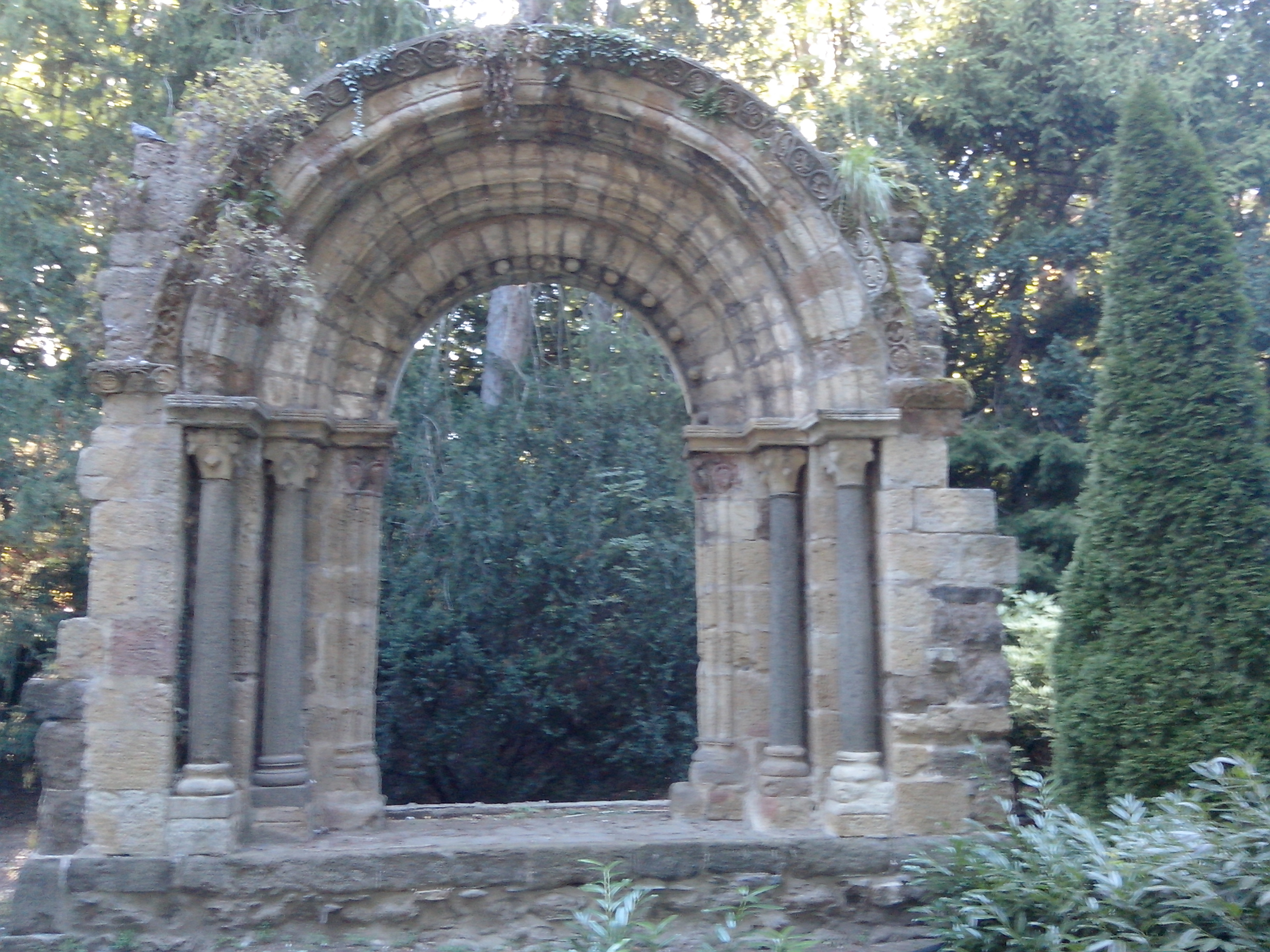 Portail roman de l'abbaye de Vorey (Classé)